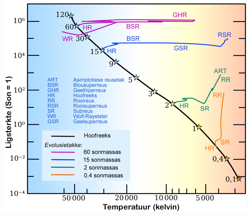 Die ligging van reusesterre op die HR-diagram.